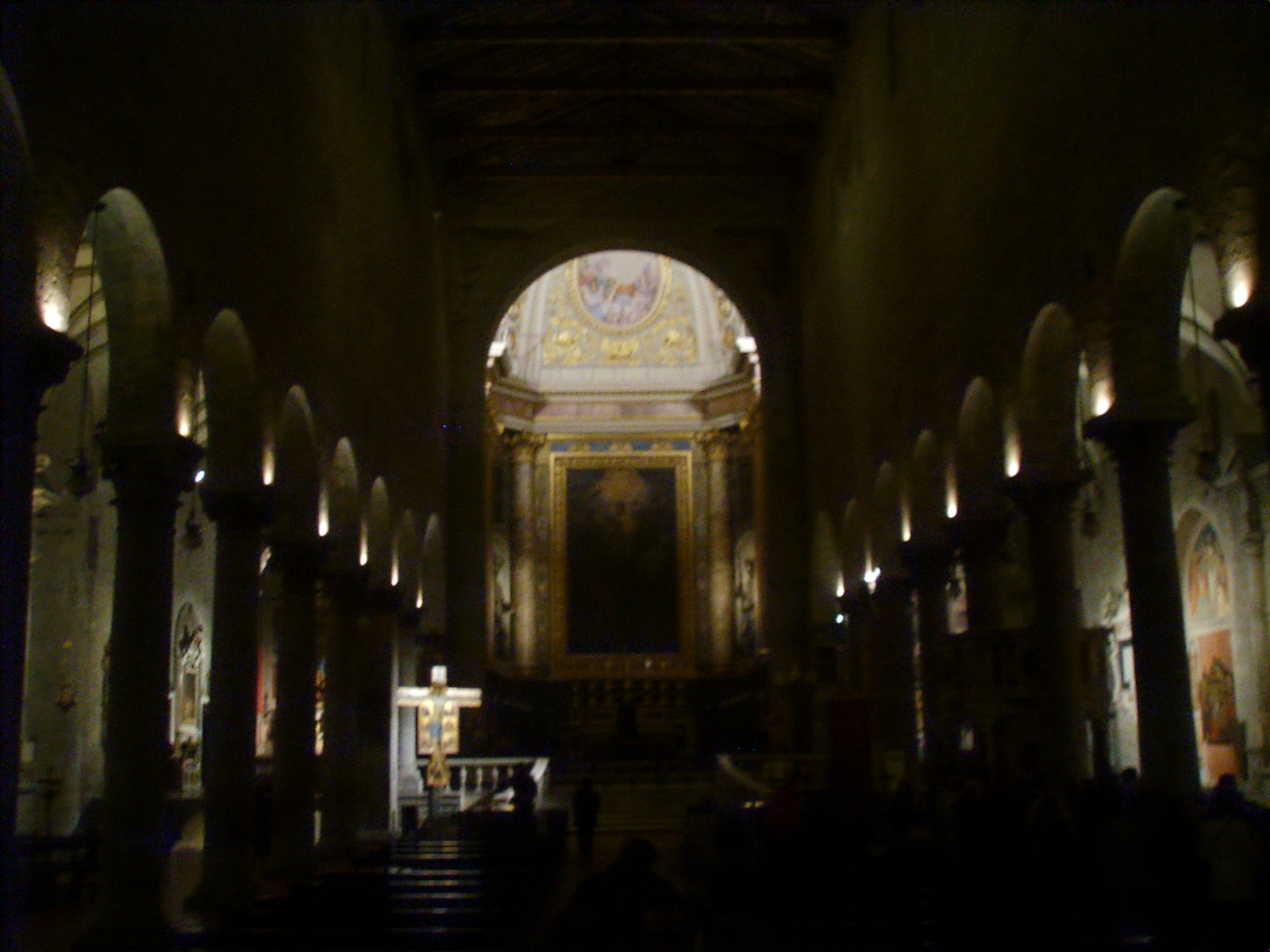 Pistoia, duomo, interno